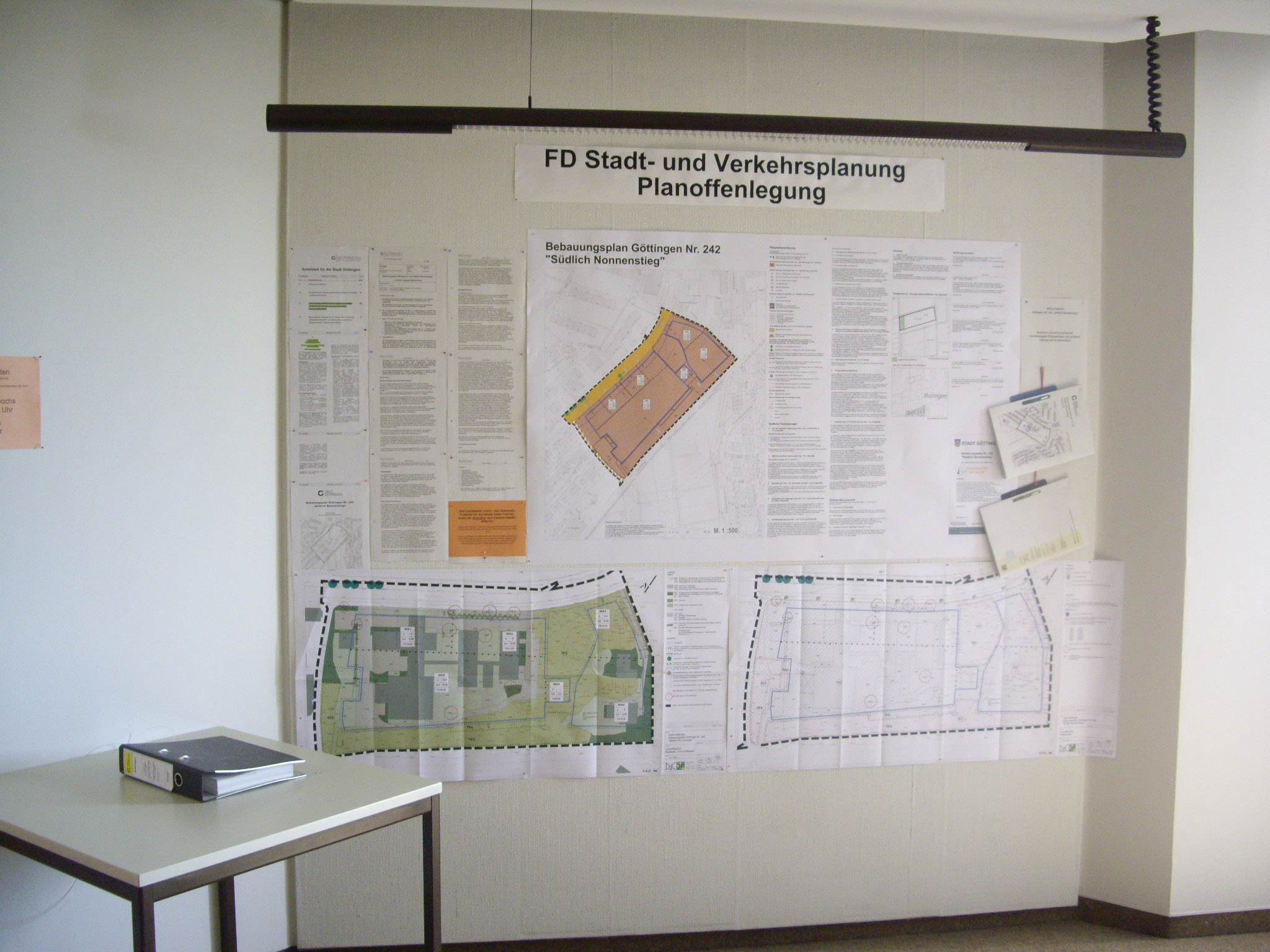 Öffentliche Auslegung des Bebauungsplans Goe242 "Südlich Nonnenstieg" (Neues Rathaus Göttingen, Flur 11. Stock) mit aushängenden Plänen und zugehörigem Ordner mit Unterlagen. Aufnahme 17. April 2014 um 15 Uhr, wenige Stunden vor Ende der zweiten Auslegungsphase.